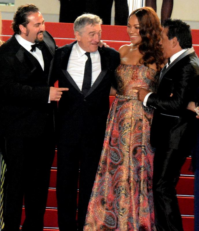 Présentation du film "Hands of stone" au festival de Cannes. De gauche à droite : le réalisateur Jonathan Jakubowicz, Robert De Niro et son épouse Grace Hightower, Roberto Durán.